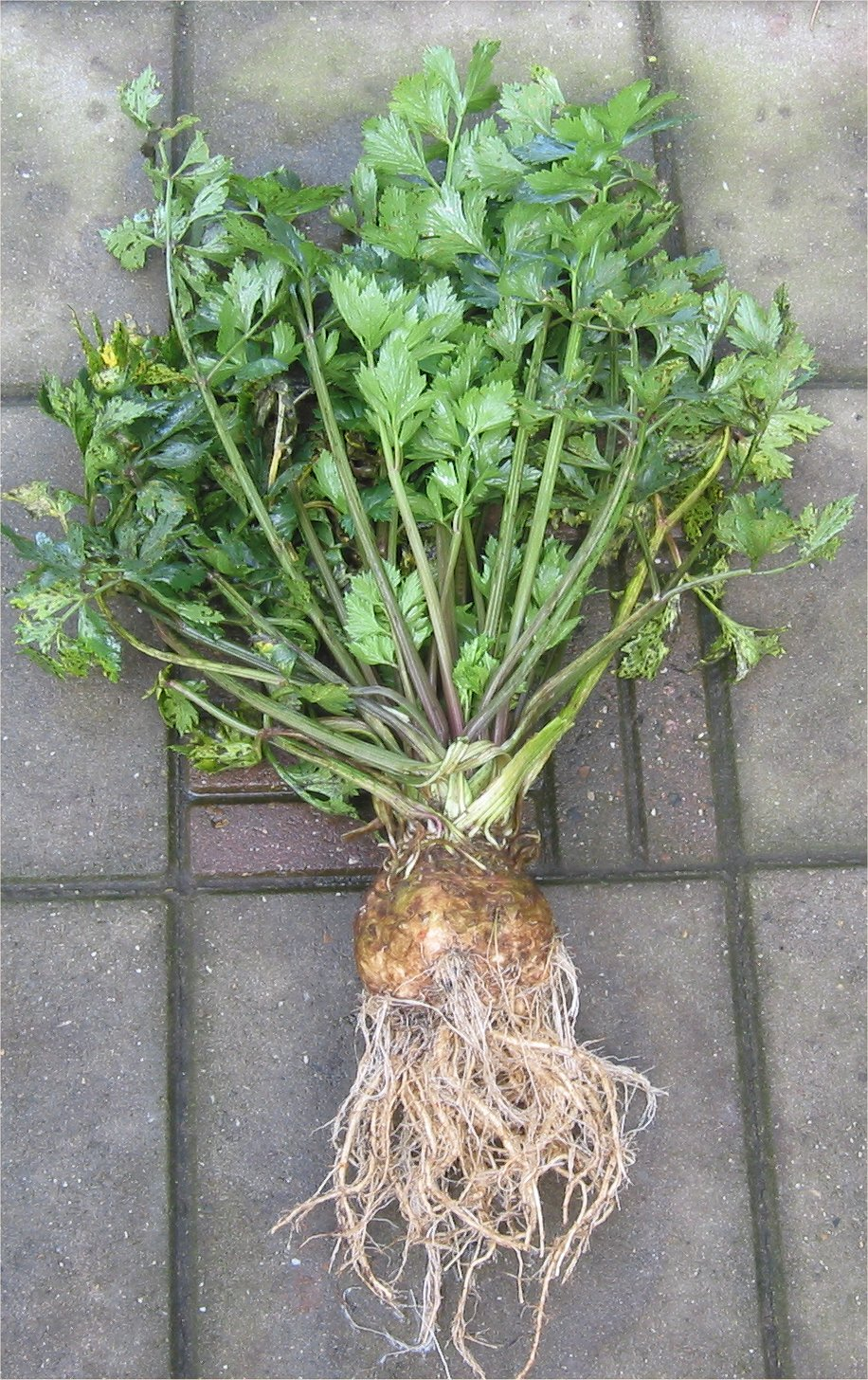 (Knolselderij plant) Apium graveolens var. rapaceum 'Dolvi'